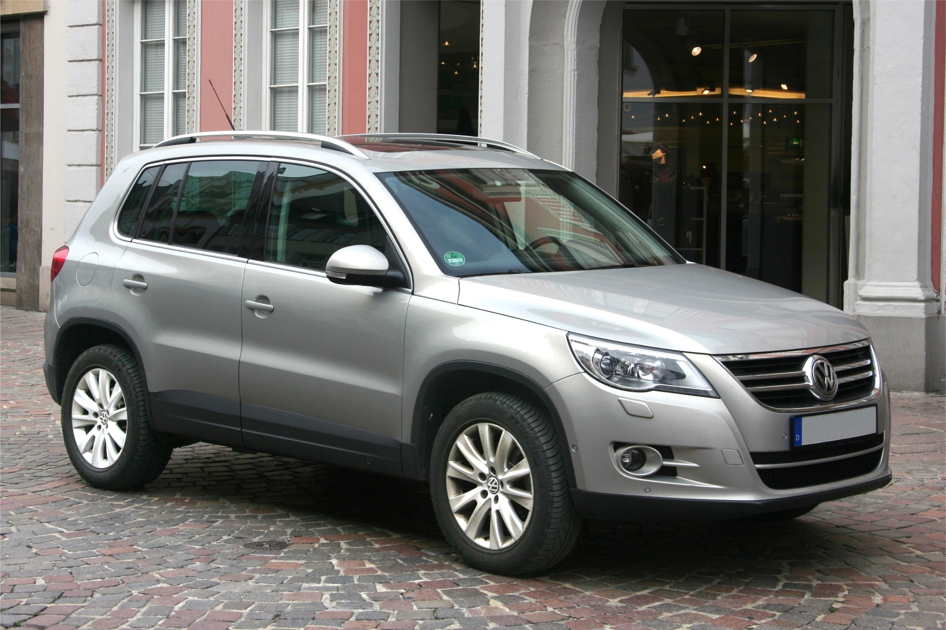 VW Tiguan TDI 2.0, Erstzulassung 2008-06